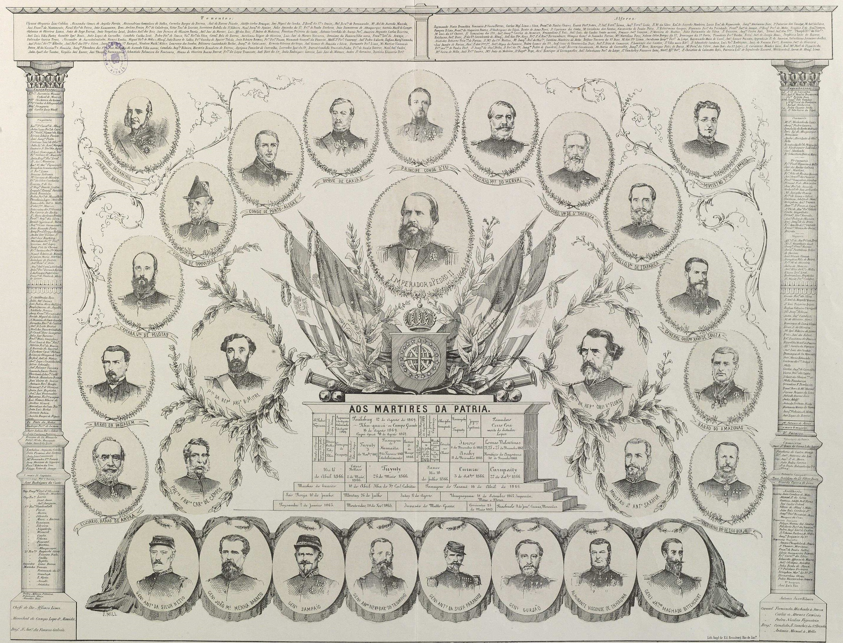 Aos mártires da pátria